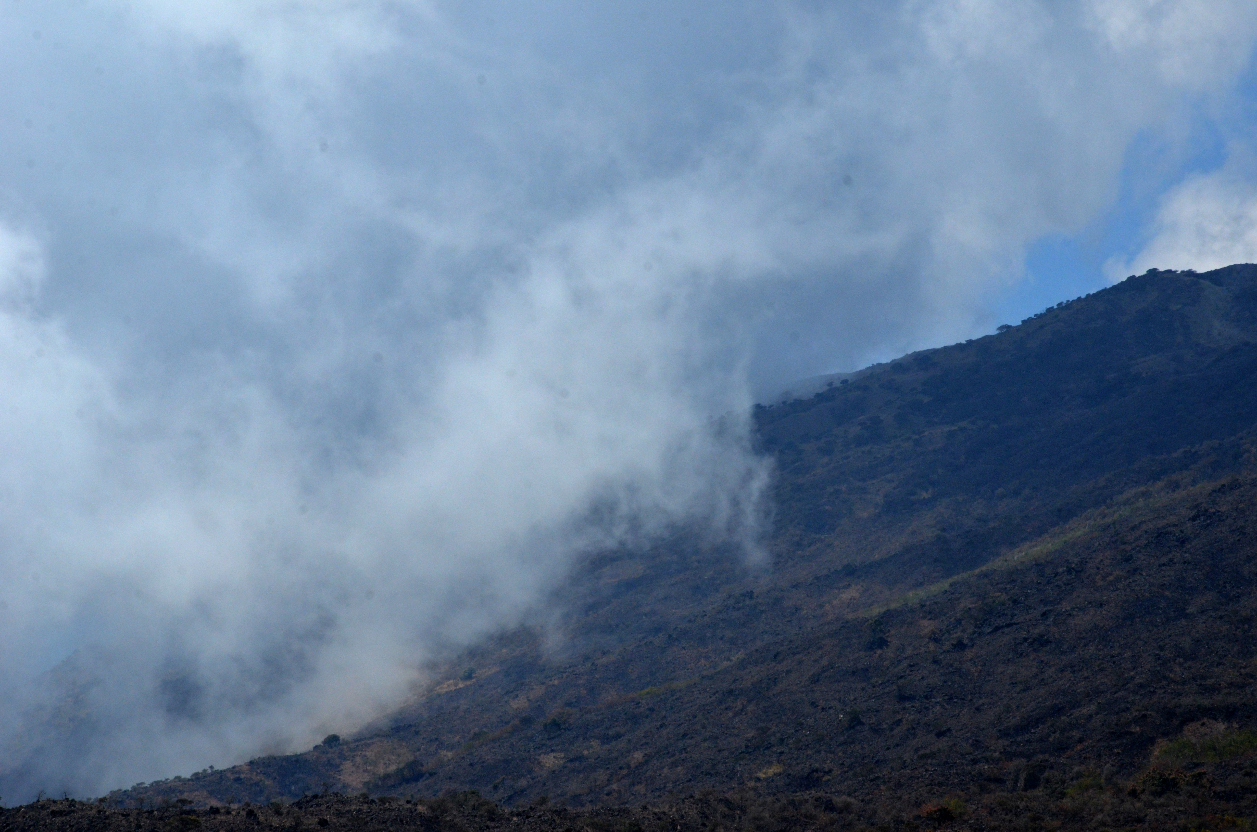 Au sommet du Mont Cameroun